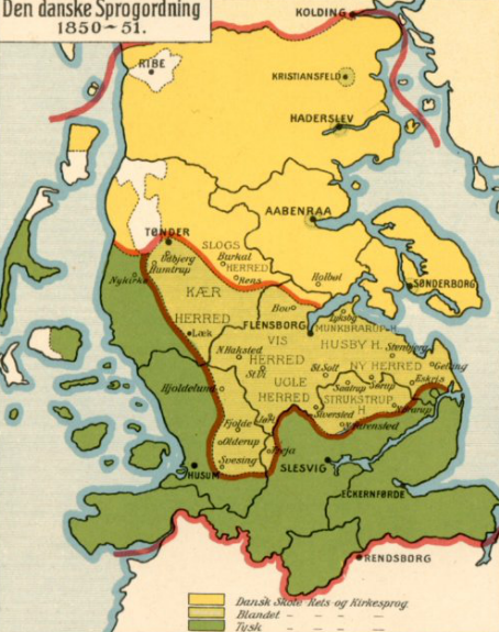 Gustav Rosendal - Den danske sprogordning fra 1913